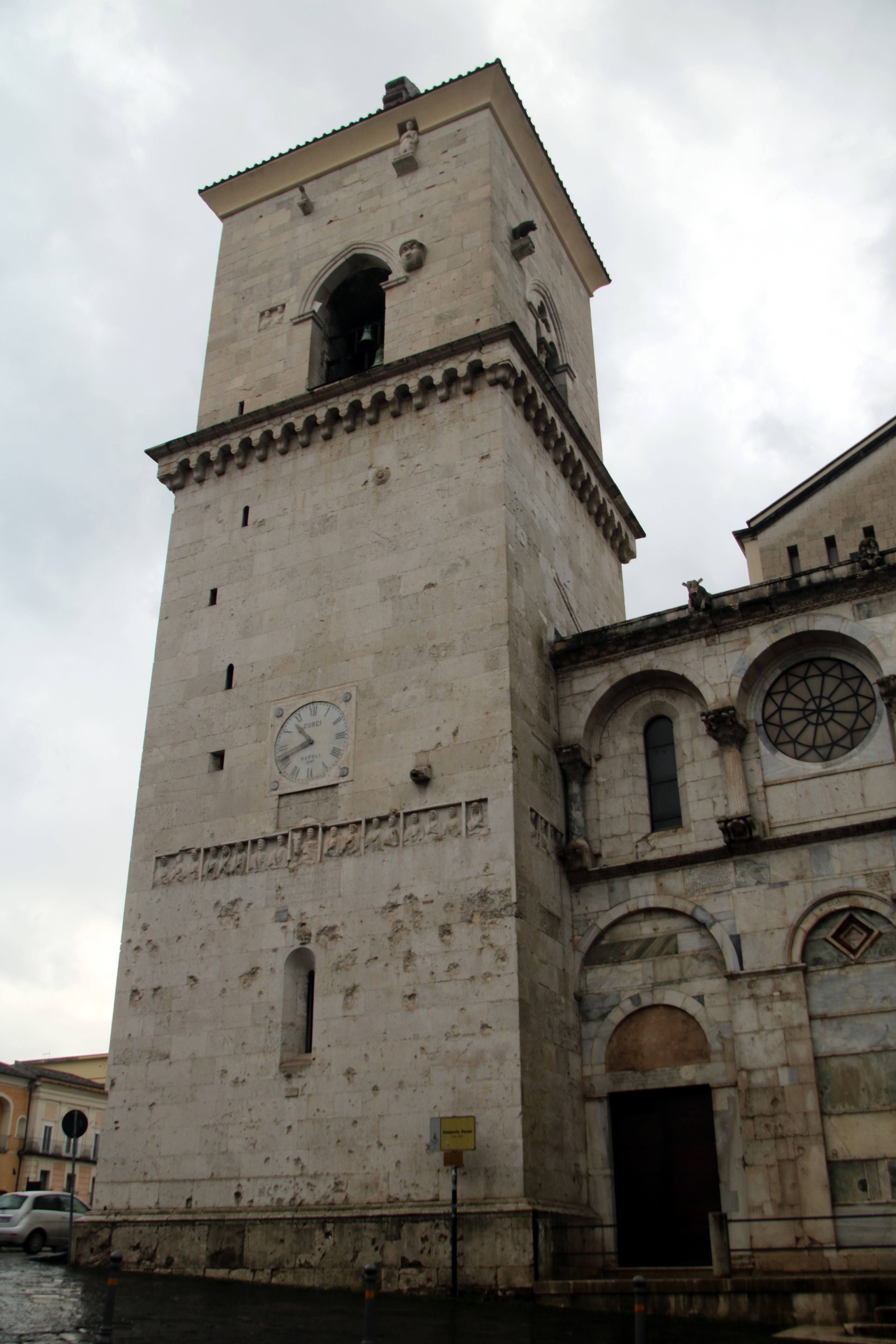 Duomo di Benevento, campanile